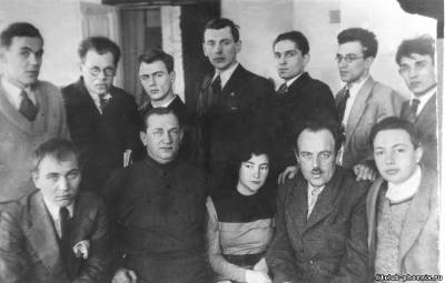 Фото советских поэтов и писателей на Первом всесоюзном съезде советских писателей (1934) Коваленков А.А. стоит, третий справа, рядом с Сергеем Михалковым. Кроме них запечатлены: в первом ряду, слева направо: Александр Шевцов, Владимир Ставский, Маргарита Алигер, Александр Безыменский, Александр Исбах. Во втором ряду: Сергей Васильев, Григорий Бровман, Евгений Долматовский, …, Илья Френкель, Василий Сидоров.